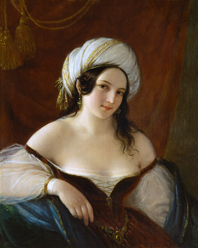 Odalisque